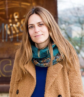 Itziar Ituño aktorea 2019an, Argia aldizkarirako elkarrizketan